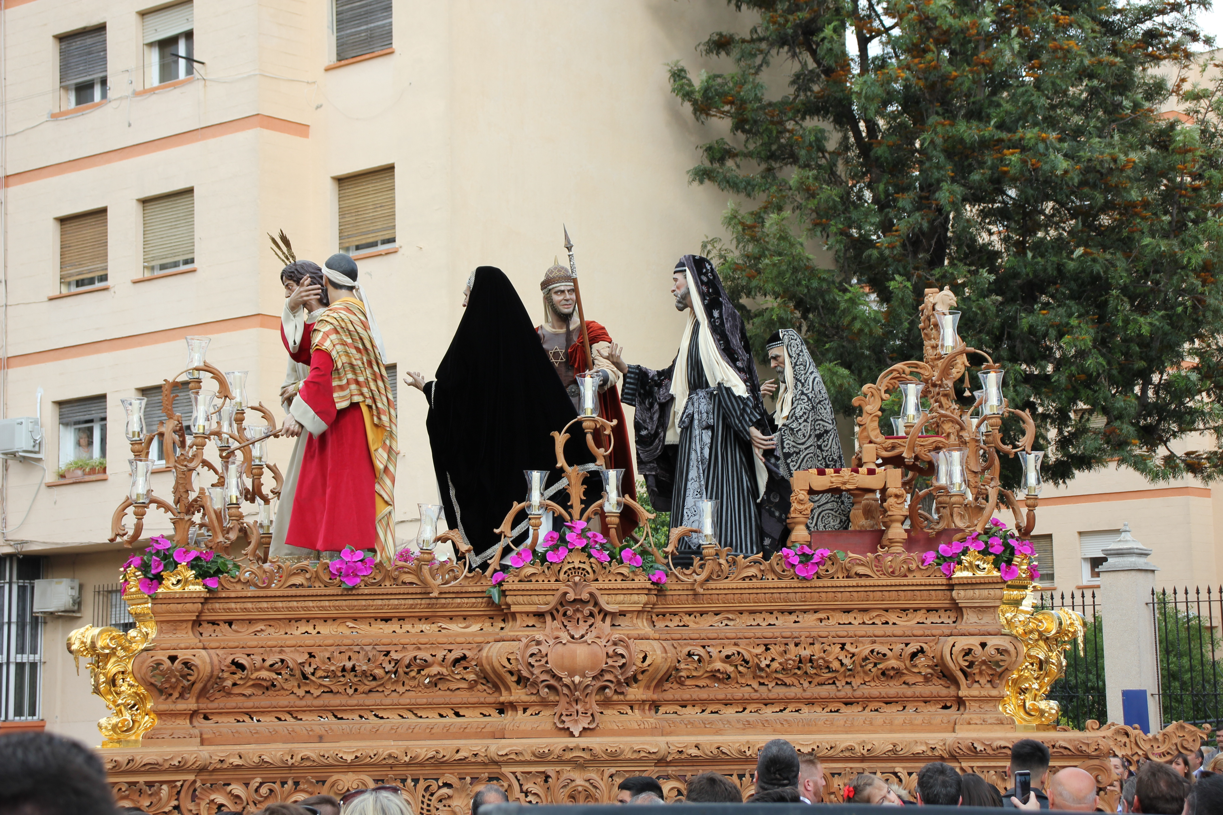 Hermandad de la Redención (Jerez de la Frontera)